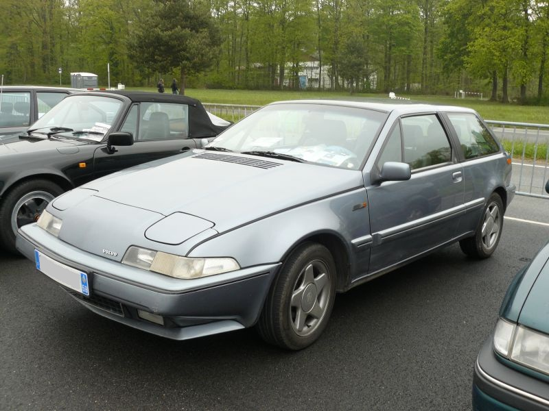 Français cadien: Montlhery avril 2012